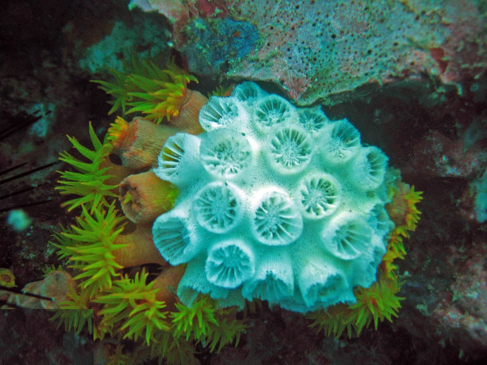 Colonia de Tubastraea micranthus afectada parcialmente por blanqueo, mostrando la estructura de sus coralitos. Koh Phangan, Tailandia